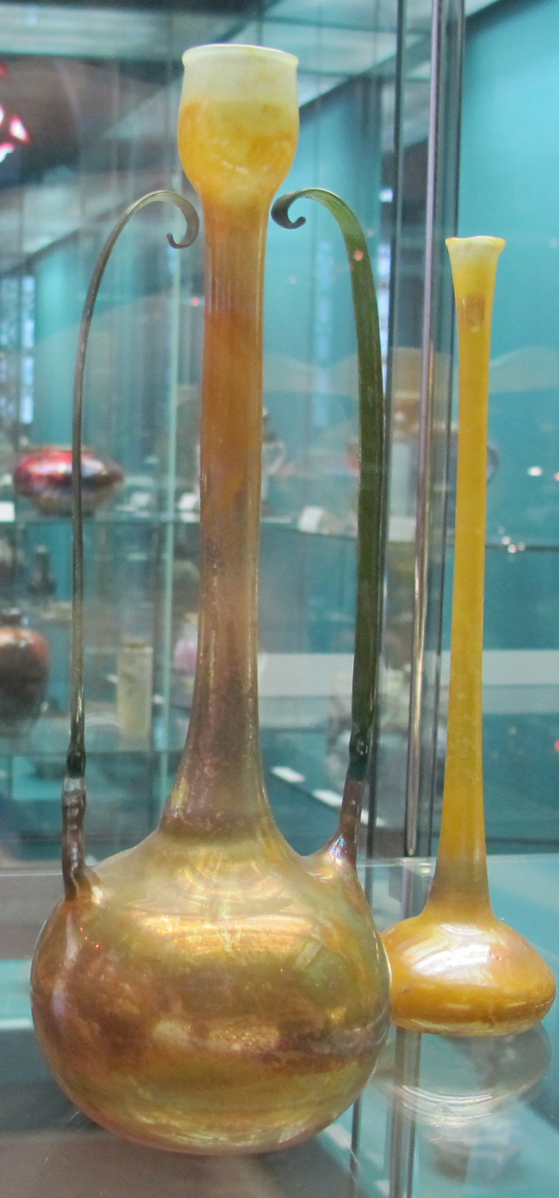 Josef emil schneckendorf, vaso, 1906